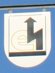 Walldorf, Baden-Württemberg: Wappenbaum an der Hauptstraße: Innungswappen der Elektrohandwerk